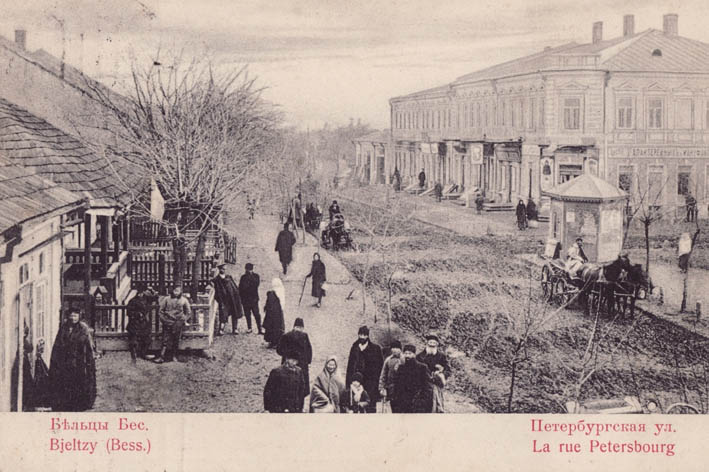 Strada Peterburgului în Bălți între secolele XIX și XX (în prezent strada Ștefan cel Mare)